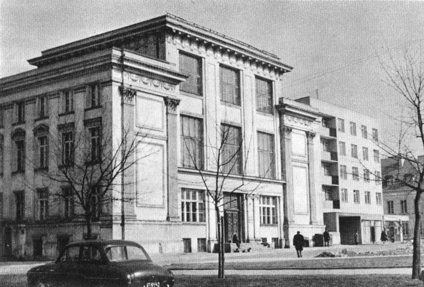 Budynek Głównej Biblioteki Judaistycznej, siedziba Żydowskiego Instytutu Historycznego